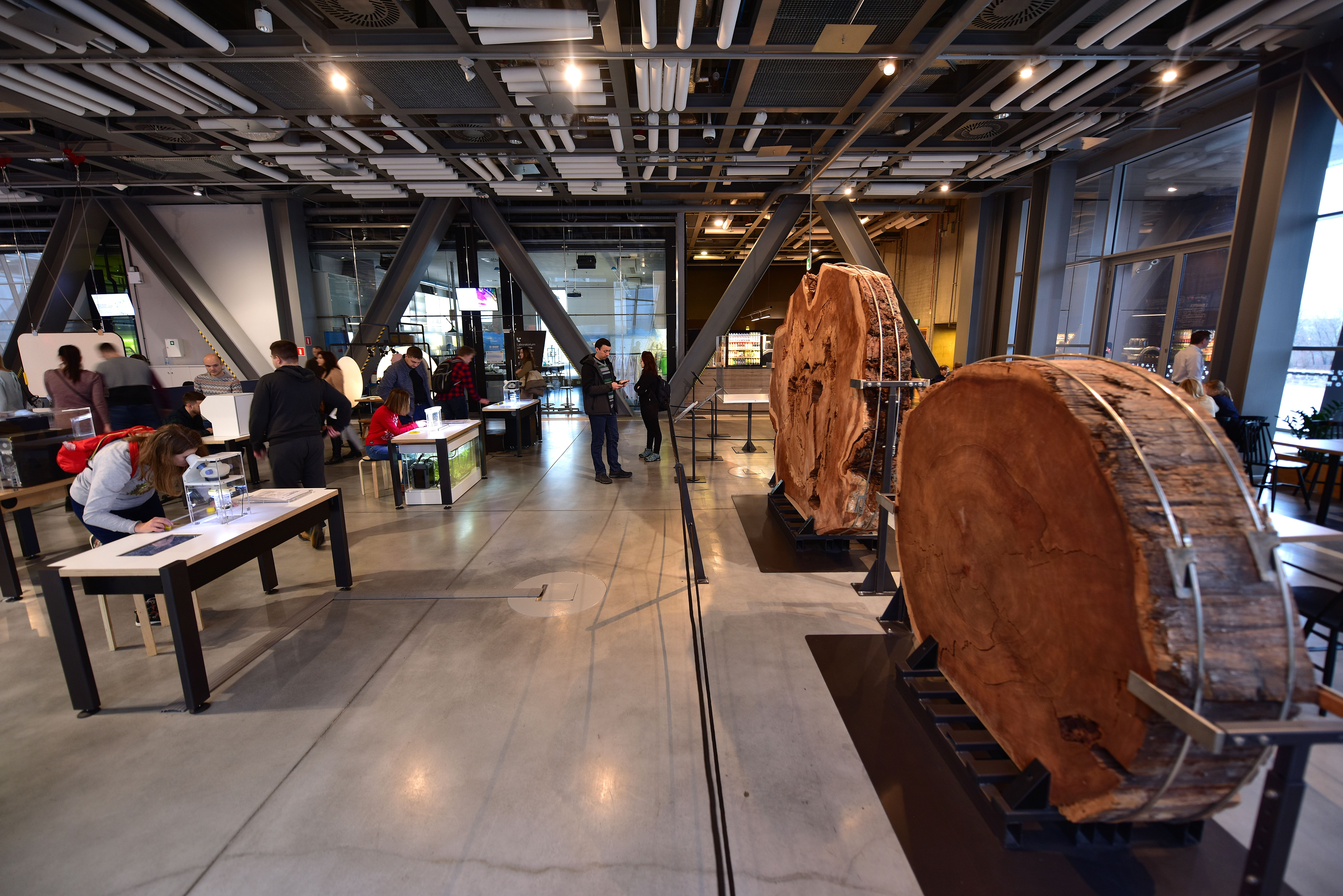 Centrum Nauki Kopernik w Warszawie